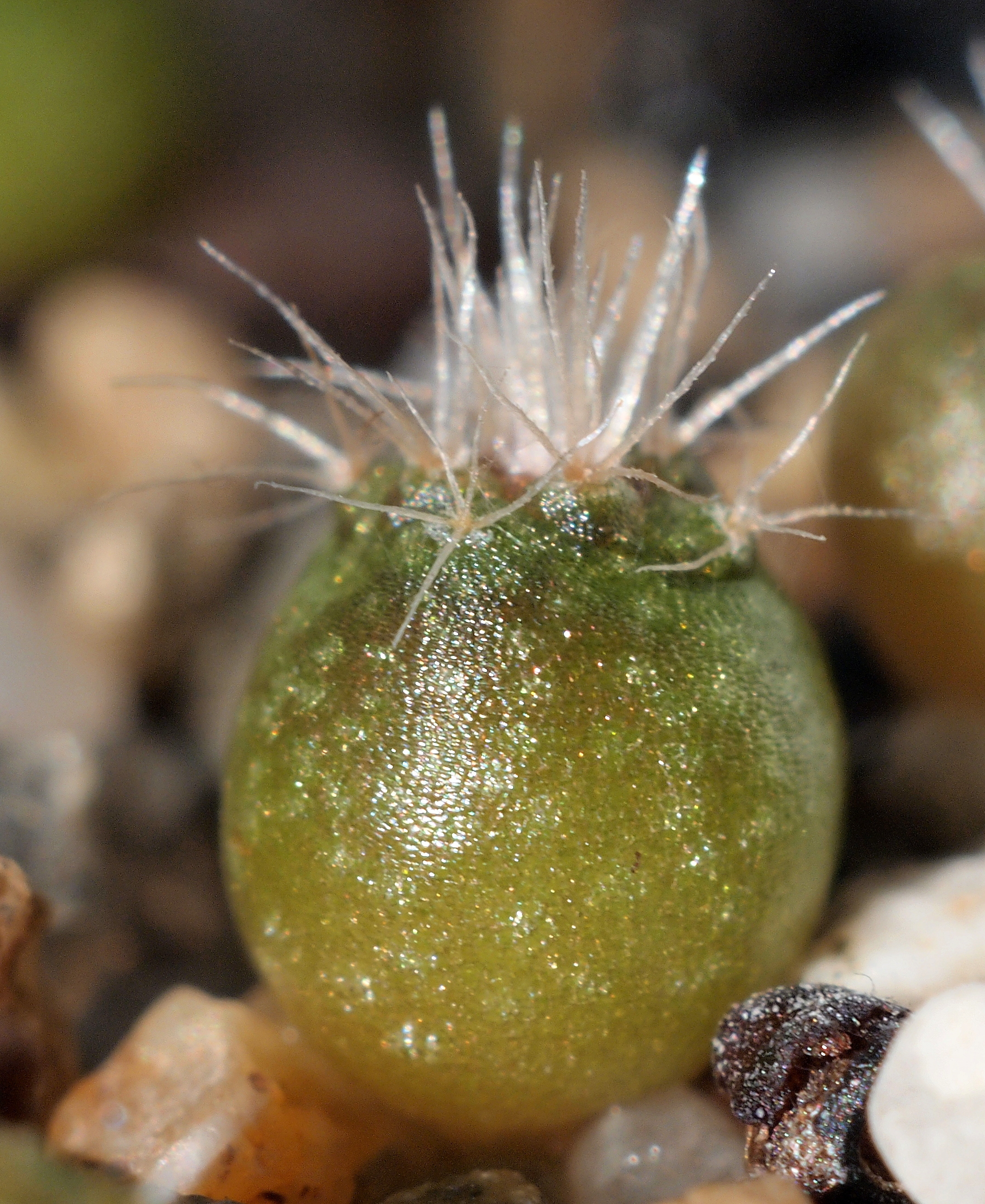 Seedling of Frailea phaeodisca